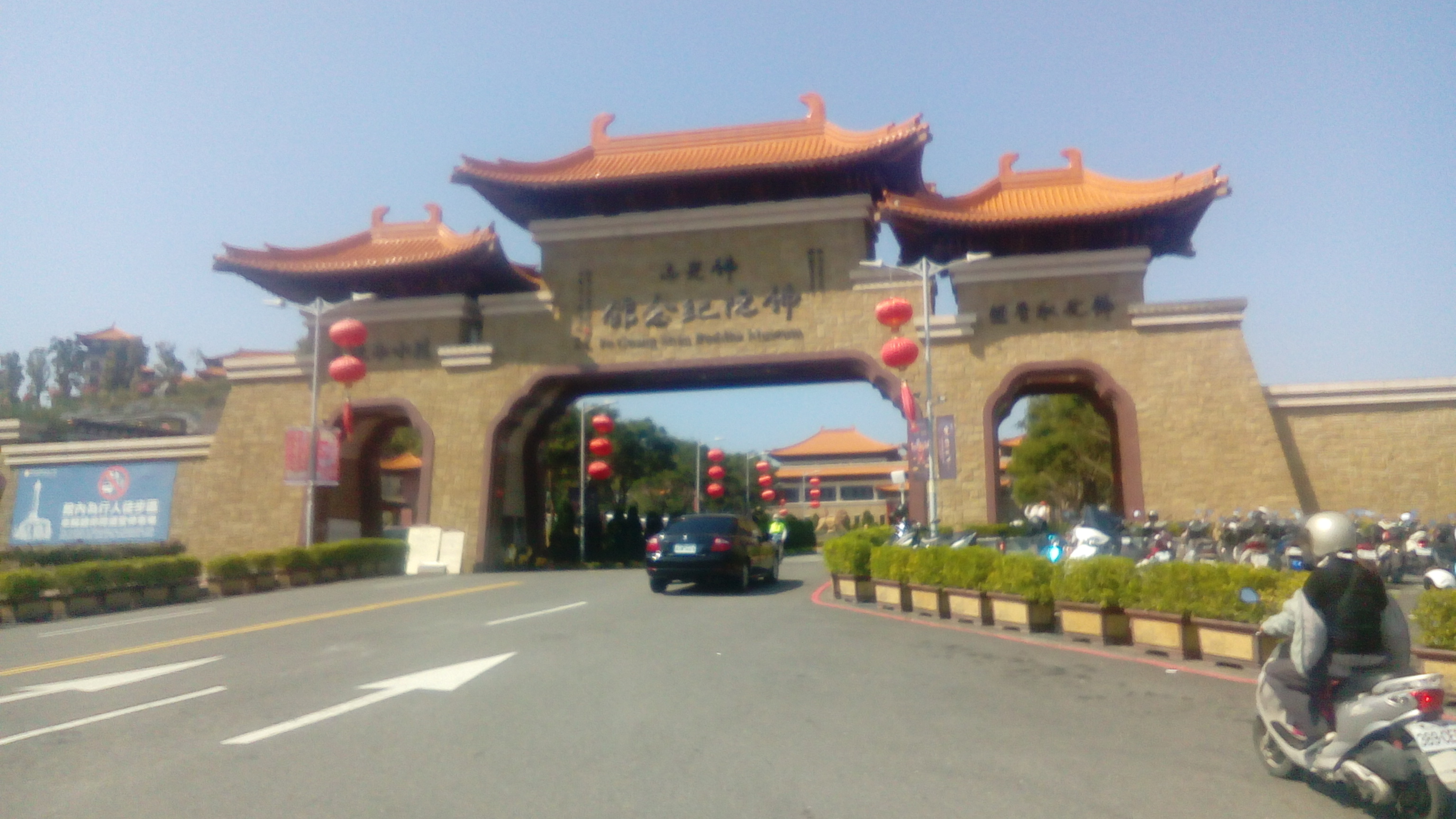 台29線入口處